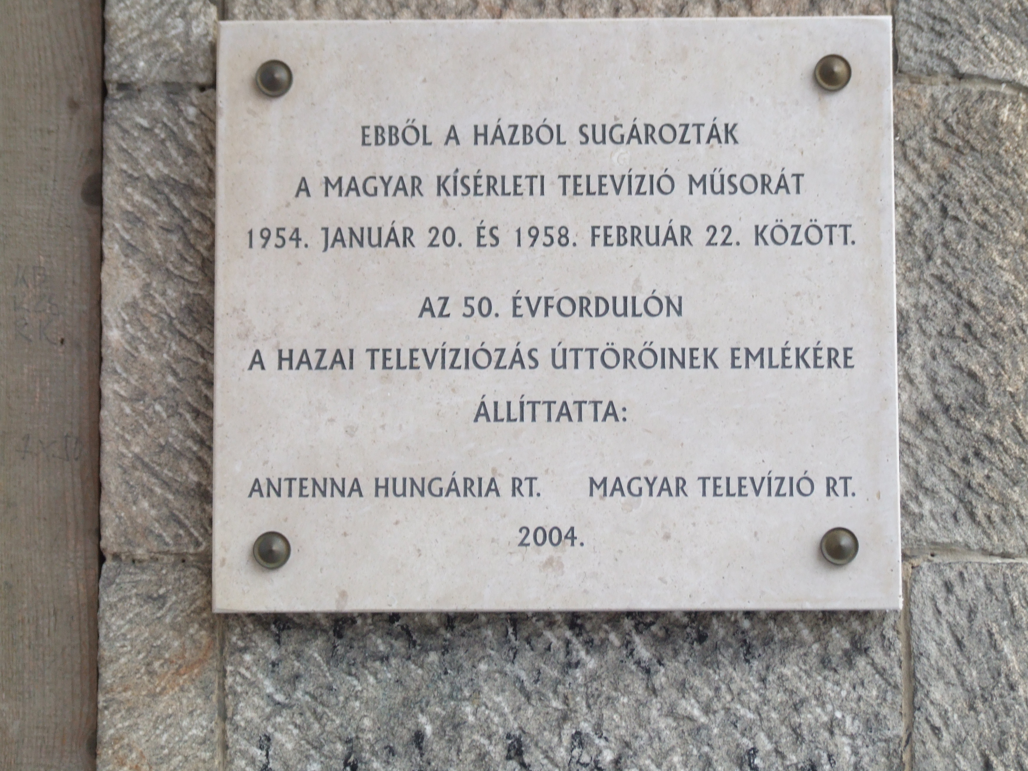 Emléktábla a háznak, amelyből a Magyar Kísérleti Televízió adását sugározták. Budapest XII. kerület, Agancs út 30-32.